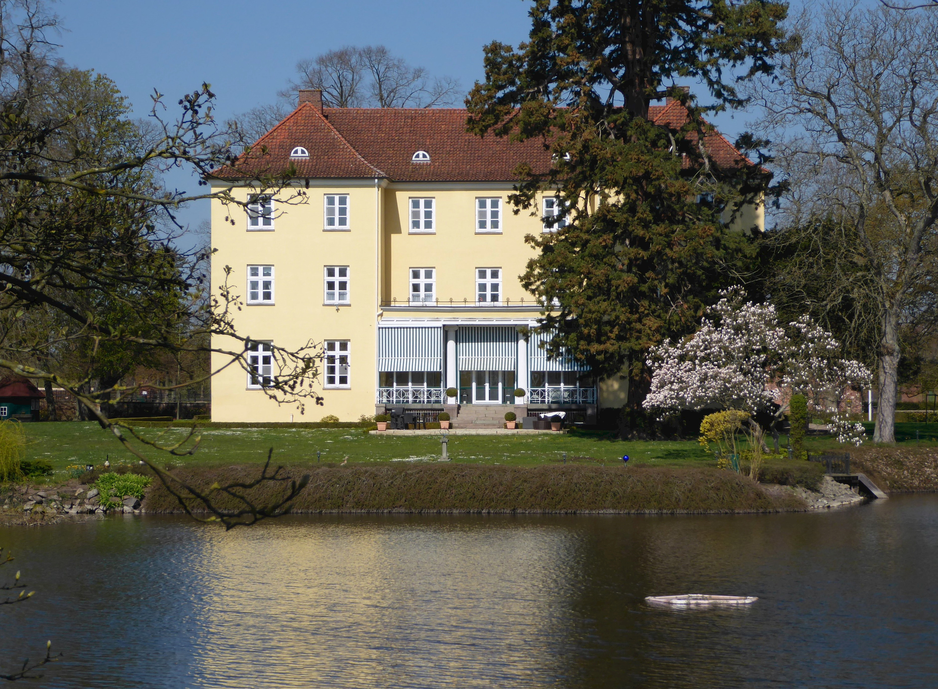 Sierhagen, huvudbyggnad